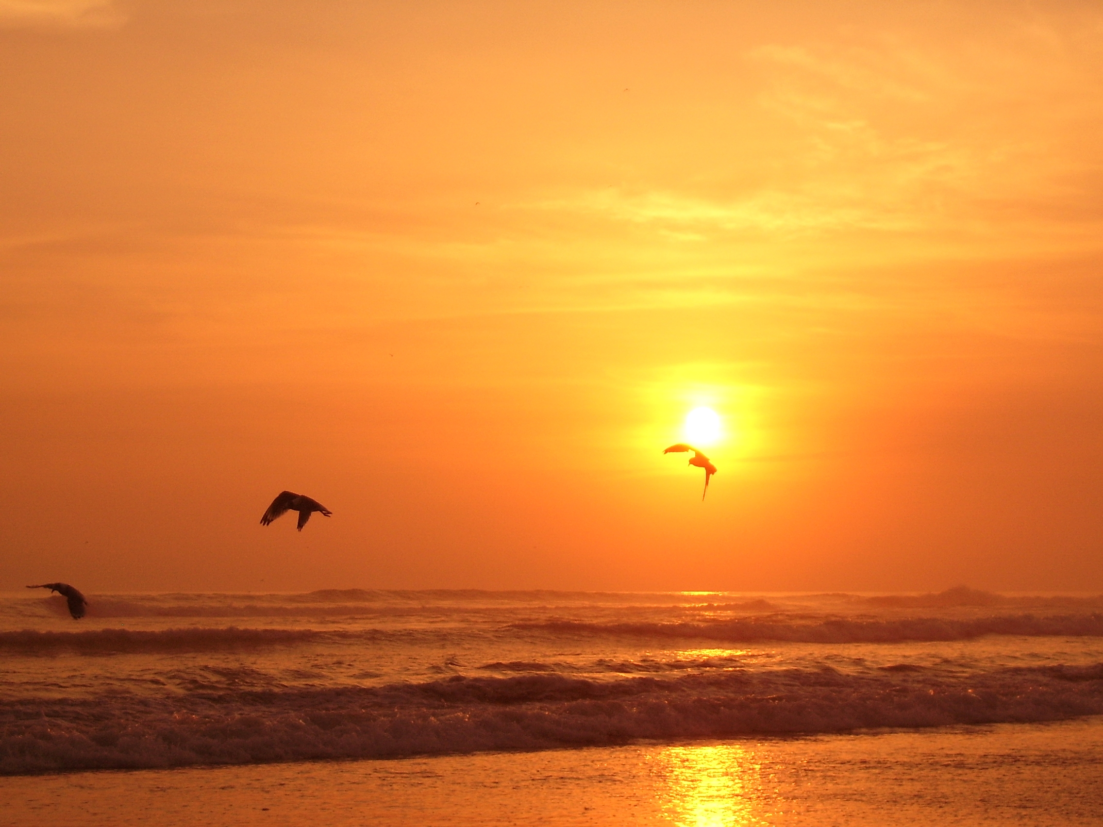 Atardecer en La Punta de Bombon